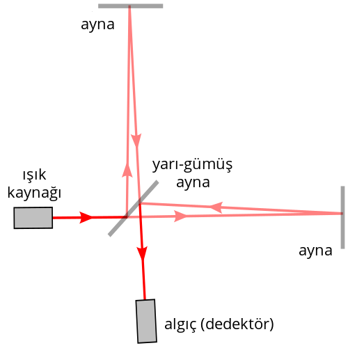 Simple Michelson interferometer diagram